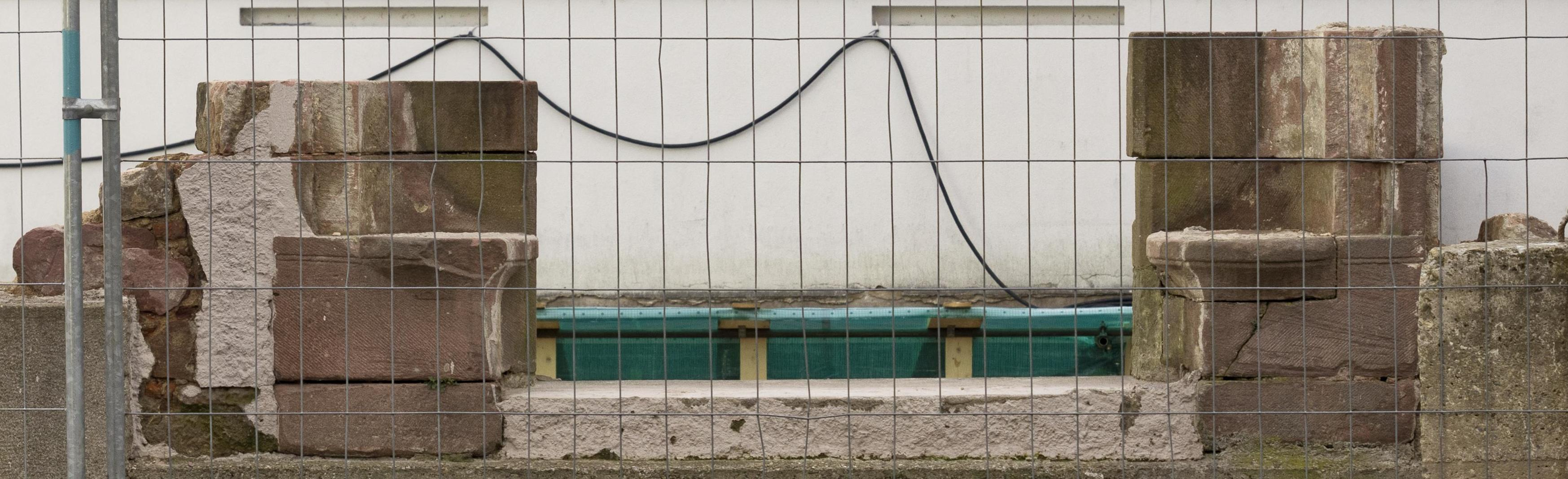 Bilder aus Freiburg Ausgrabung am Andlauschen Haus, alter Eingang